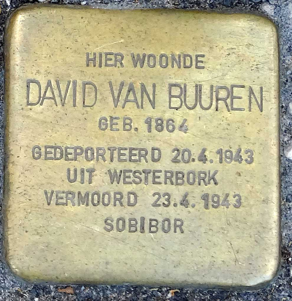 Stolpersteine - Oosthaven 31 - David van Buuren